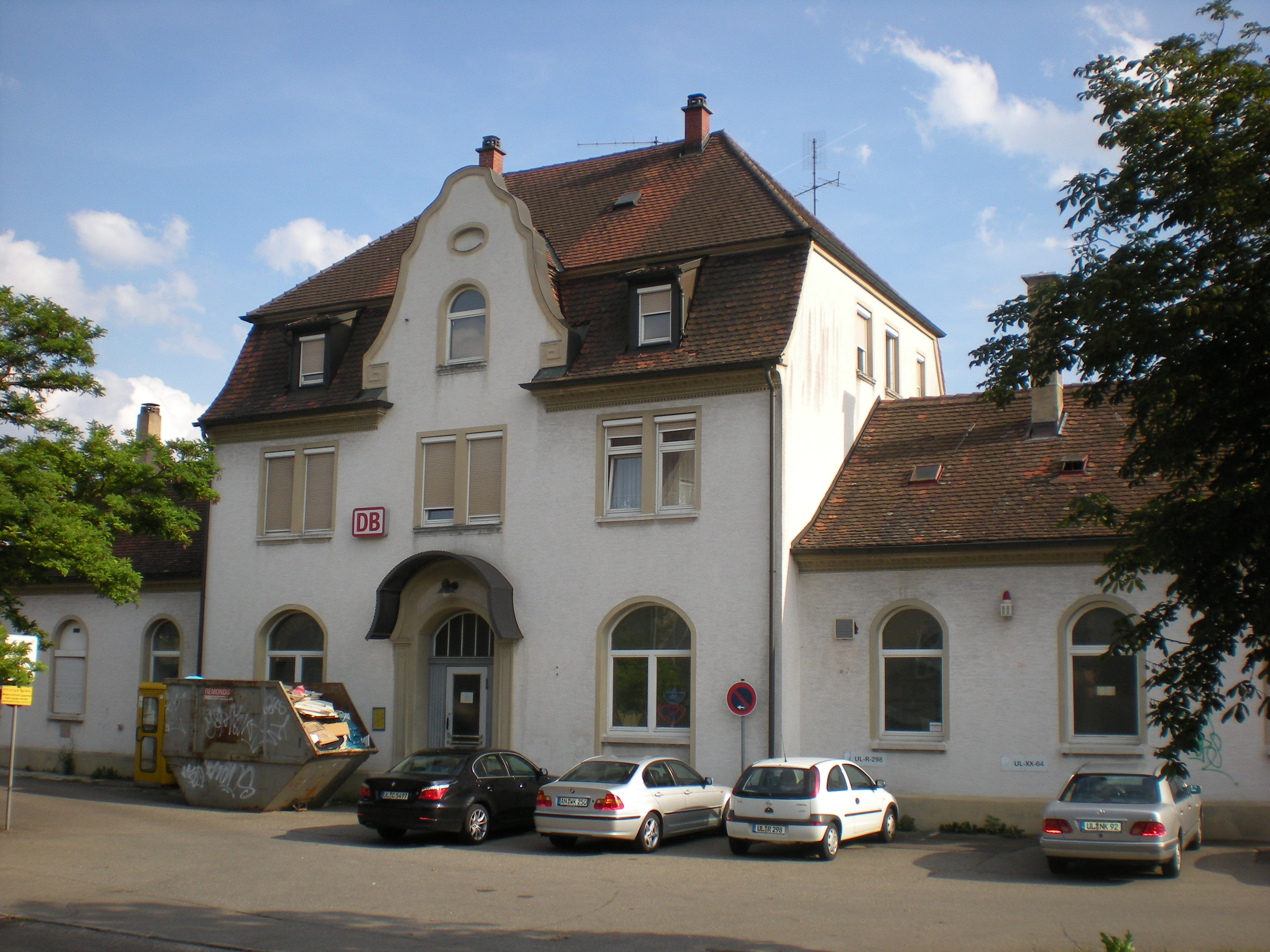 Empfangsgebäude des Bahnhofs Ulm-Söflingen von der Straßenseite